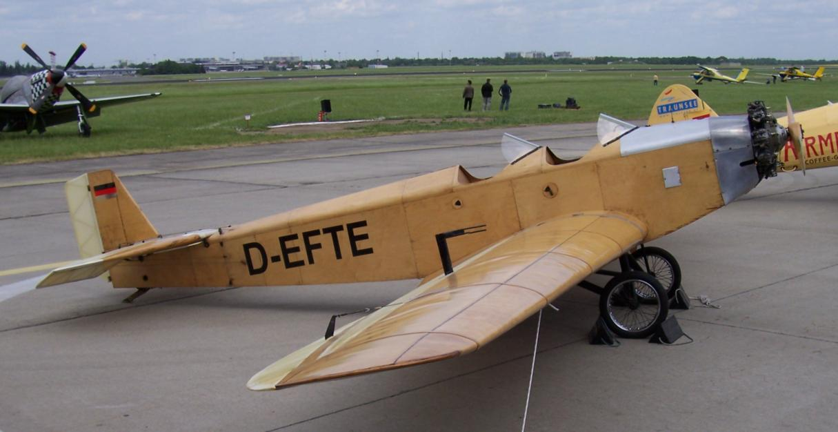 Vintage aircraft Klemm Kl 25 (also: Klemm L 25). Photograph taken myself at Internationale Luft- und Raumfahrtausstellung 2006, Berlin, Germany. Public Domain.